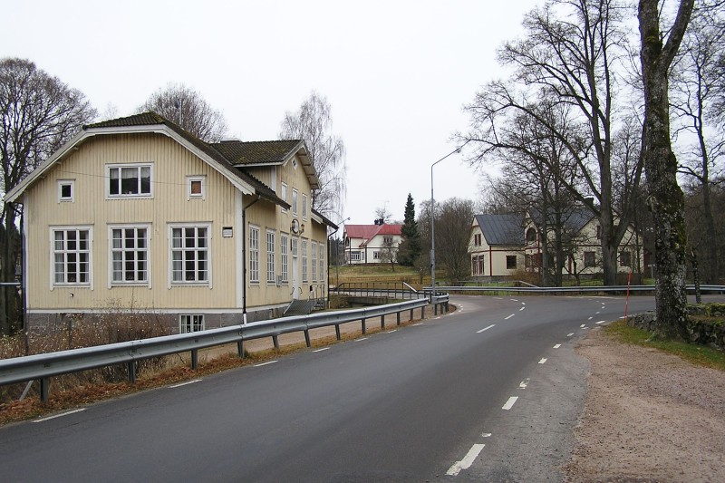 Hallaryd "centrum", vägen mot Markaryd vid vägskälet mot Delary.